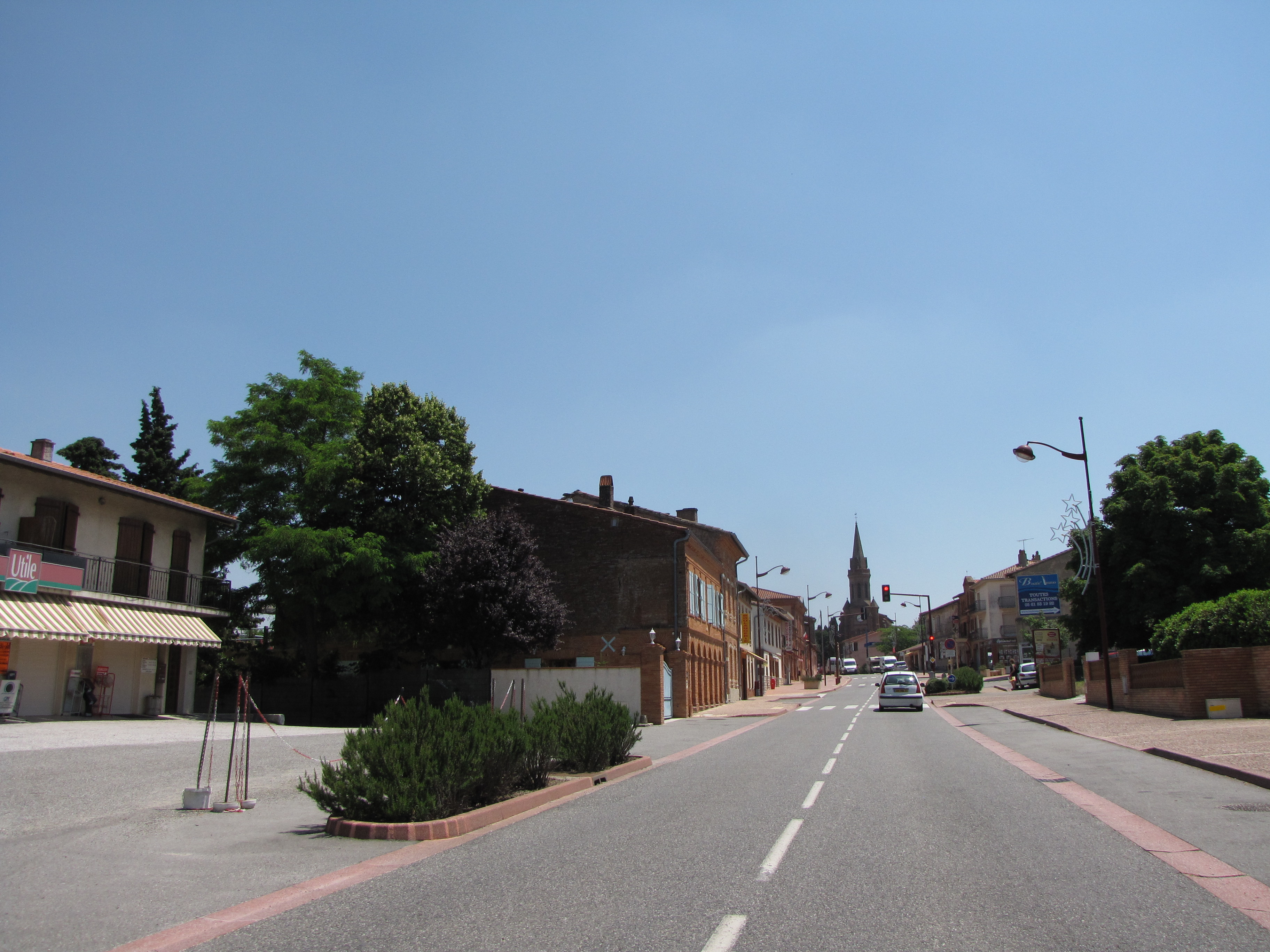 Labastide-Beauvoir